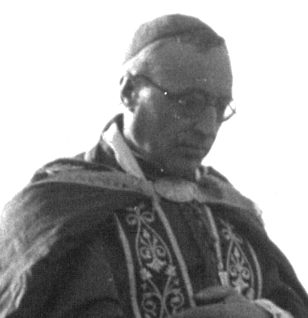 Clément Roques, archevêque d'Aix-en-Provence